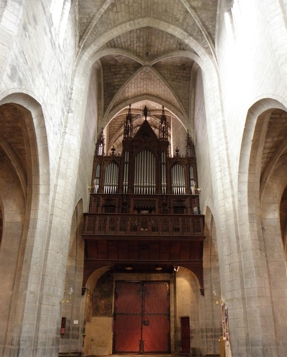 Grandes-Orgues de la cathédrale Saint-Pierre et Saint-Flour de Saint-Flour (15).